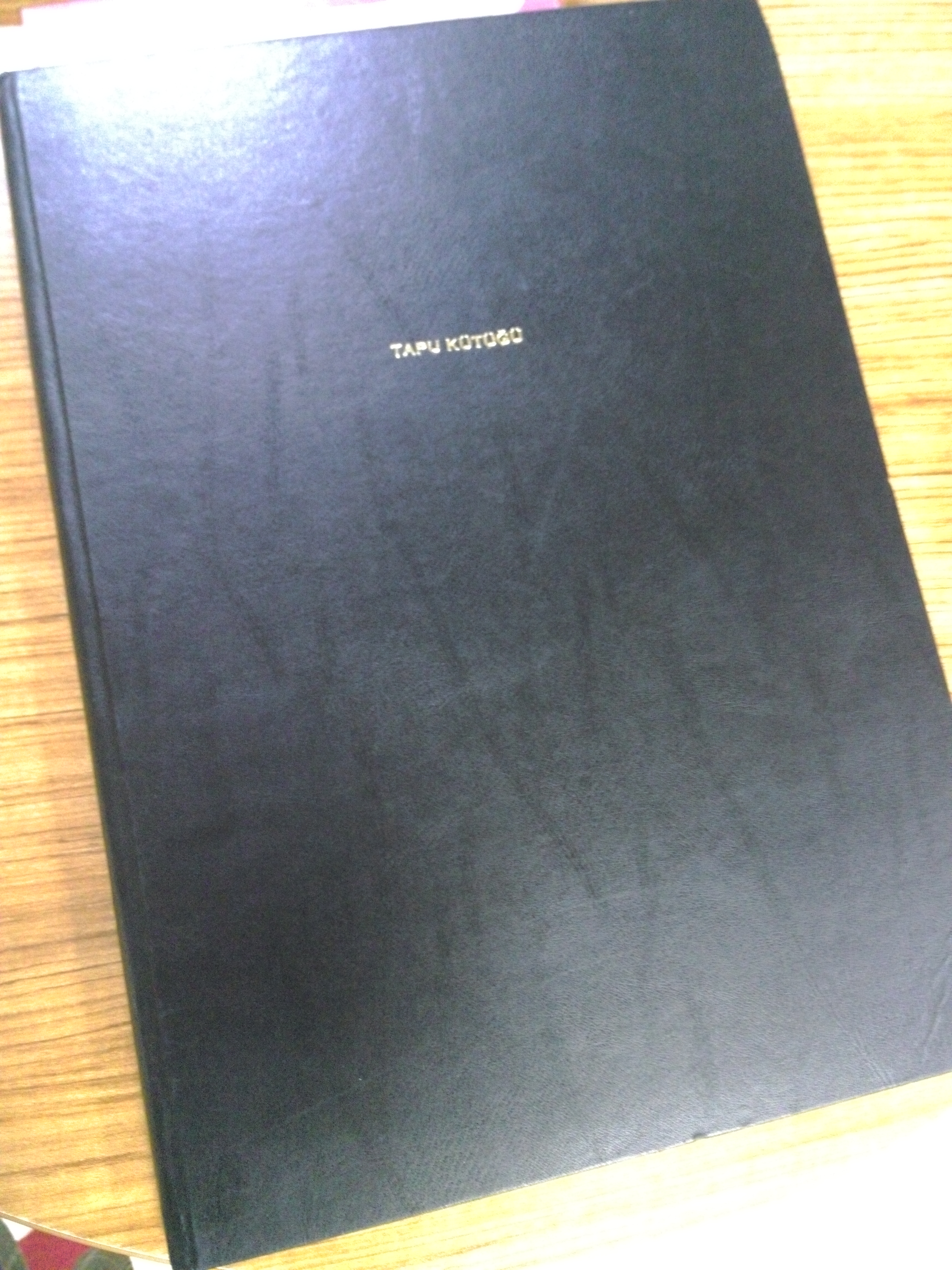 Tapu kütüğü (Manisa Tapu Müdürlüğü)